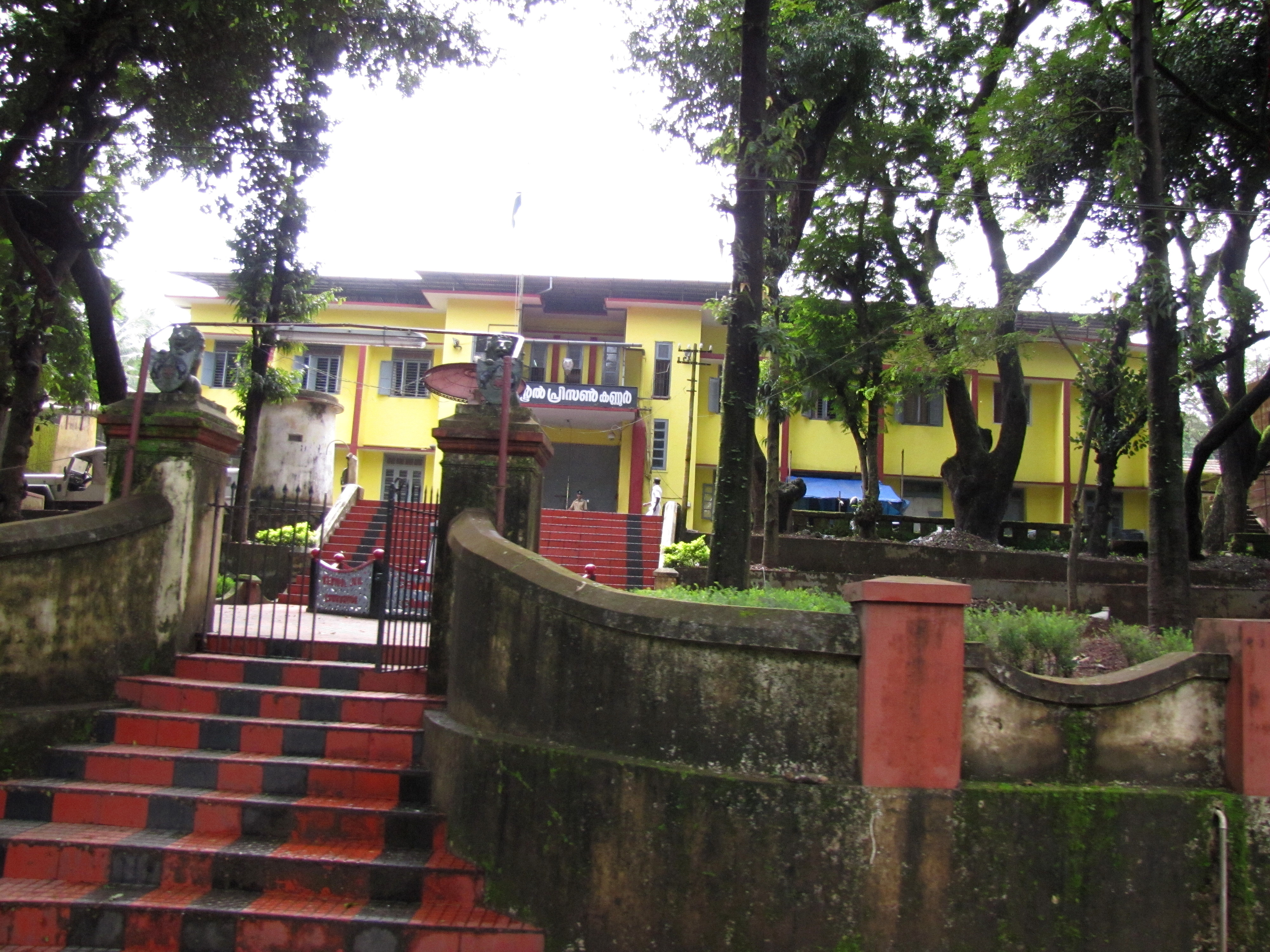 Central Prison Kannur